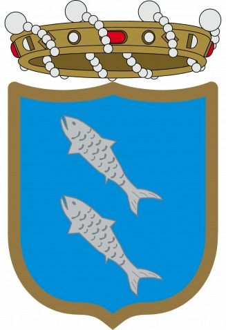 Armas de la familia Musoles